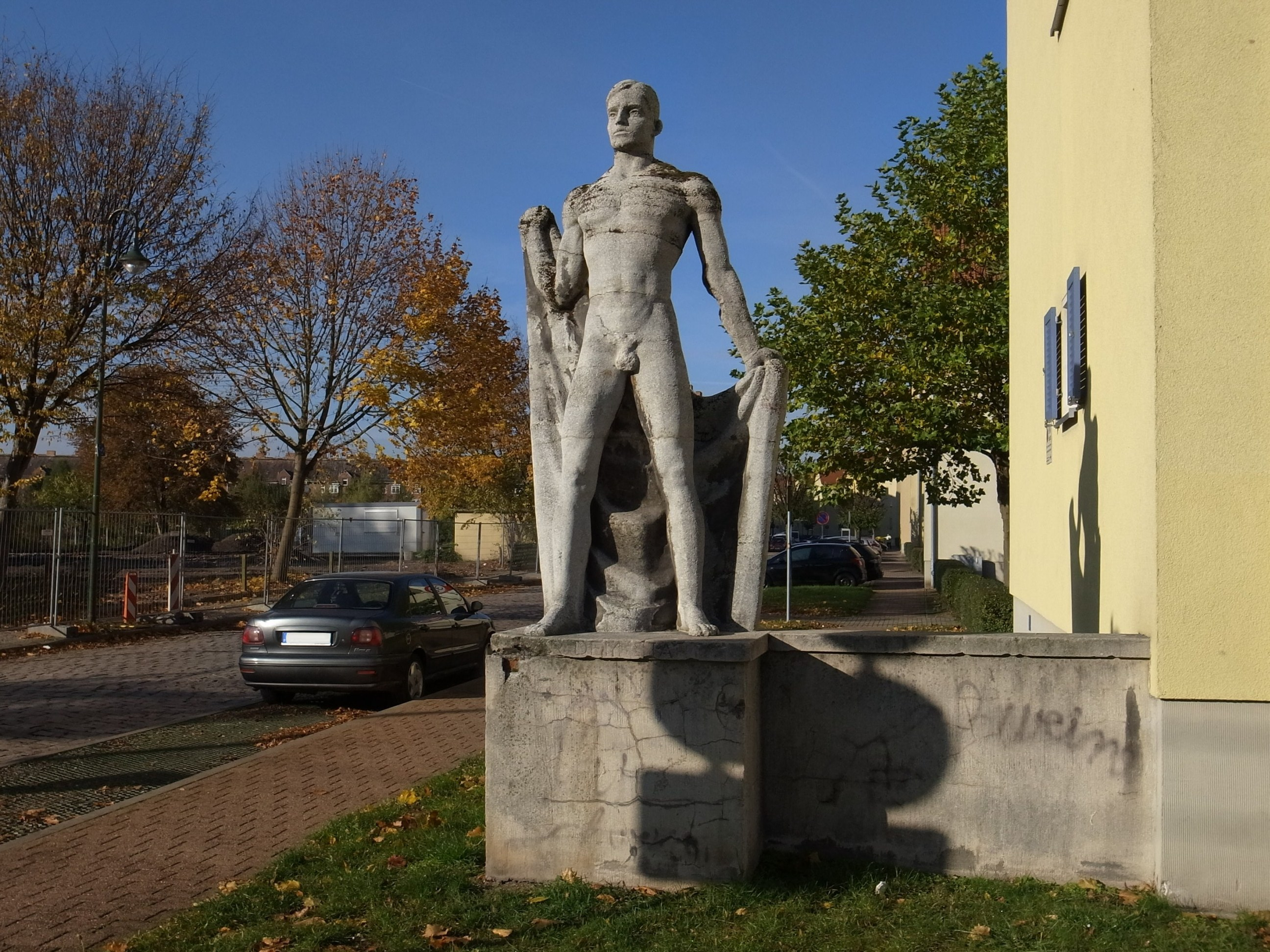 Großplastik Vor Dem Start, von Walter Kieser